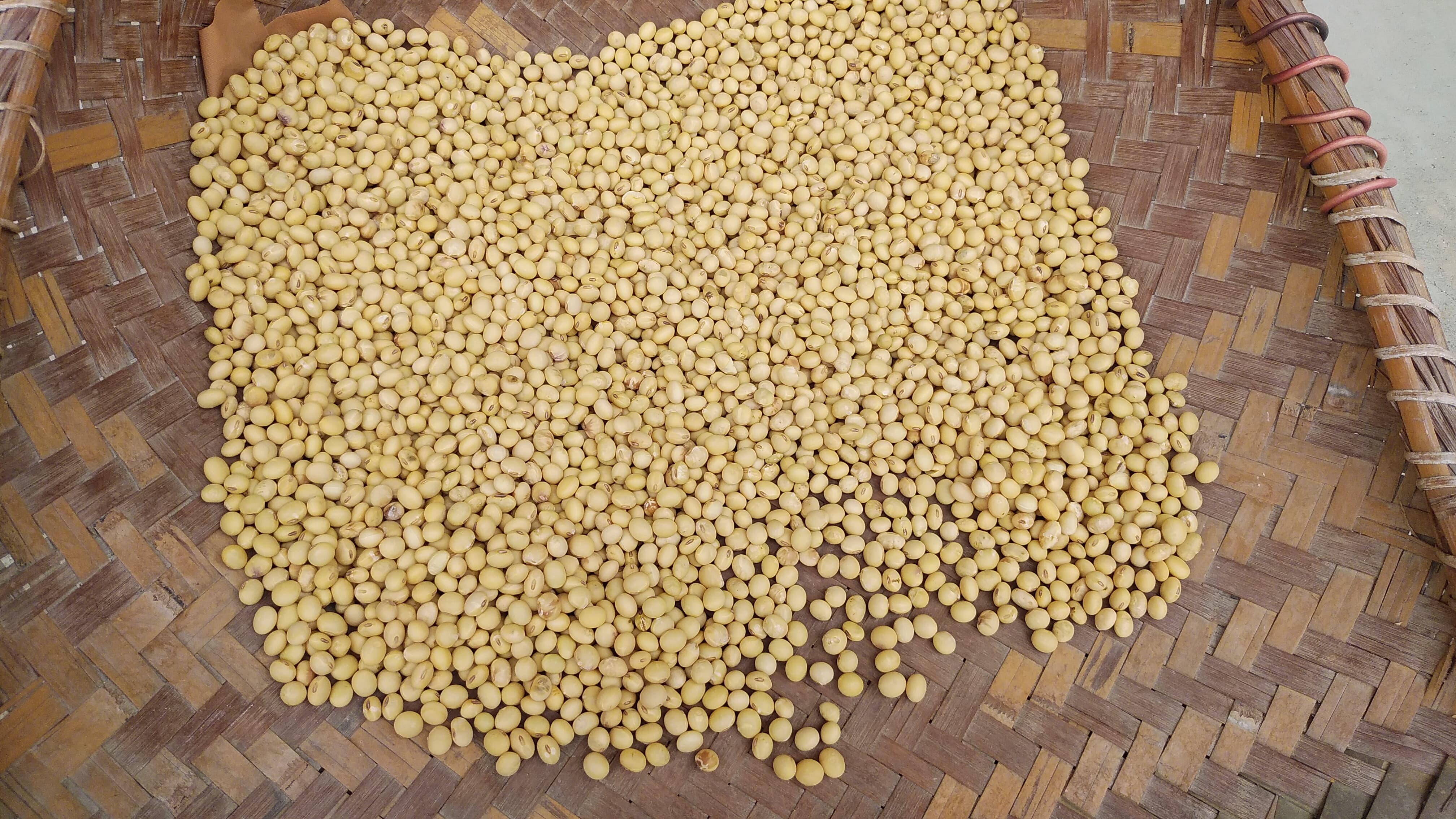 奈良県五條市の農家で収穫。 親から受け継いだ種。 味噌にするとおいしい。